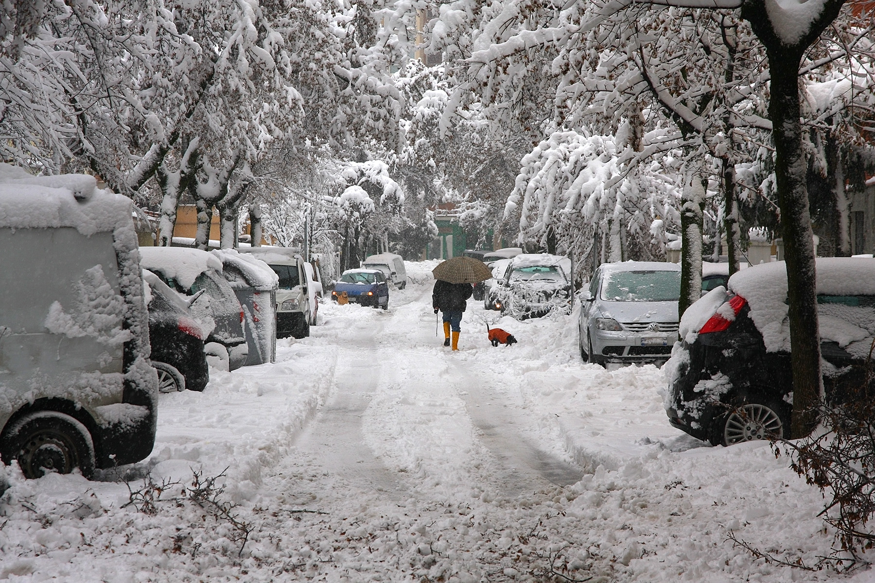 Modena